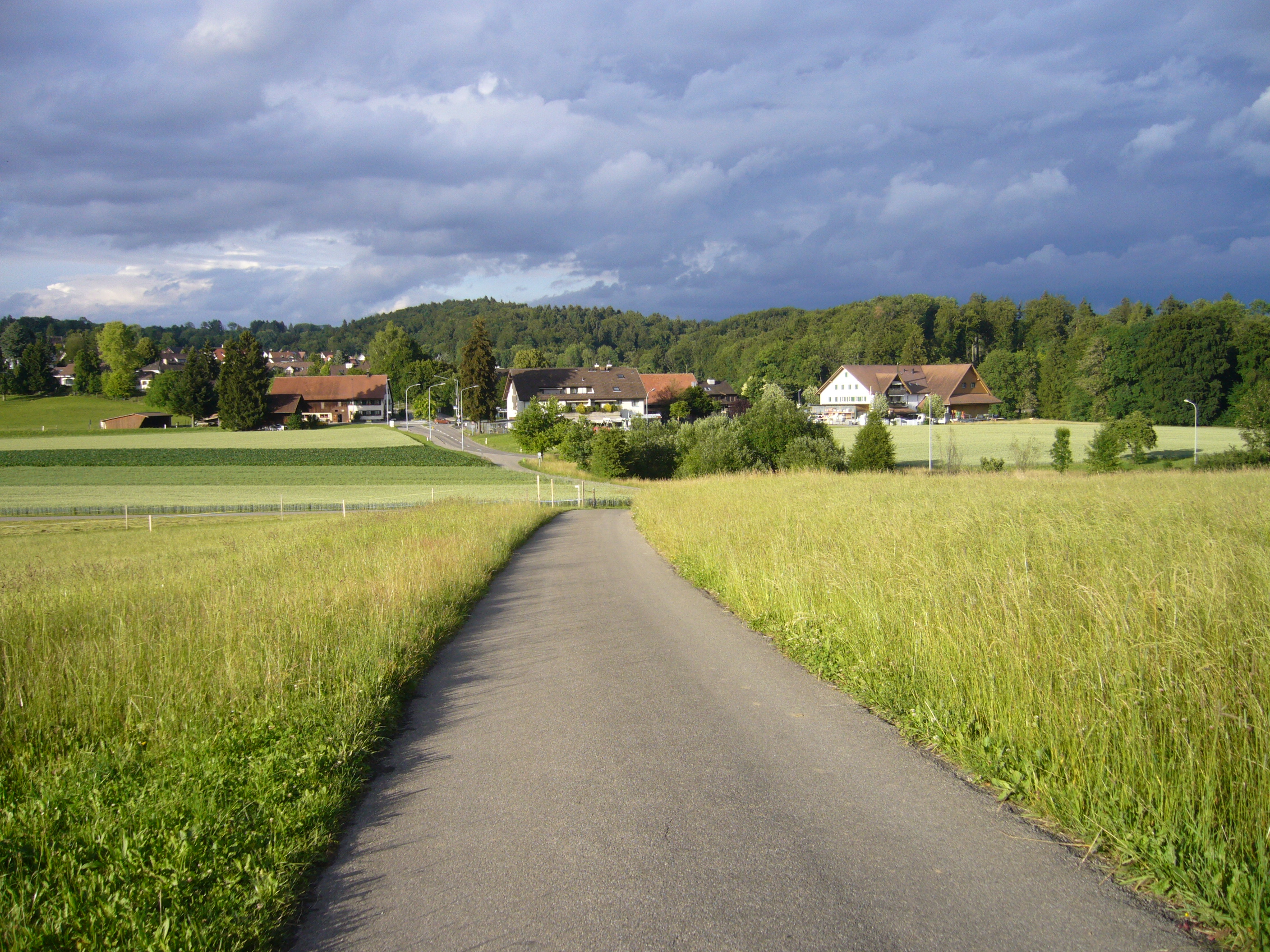 Blick von Westsüdwest auf Häuser an der Kreuzstraß zu Birchwyl.